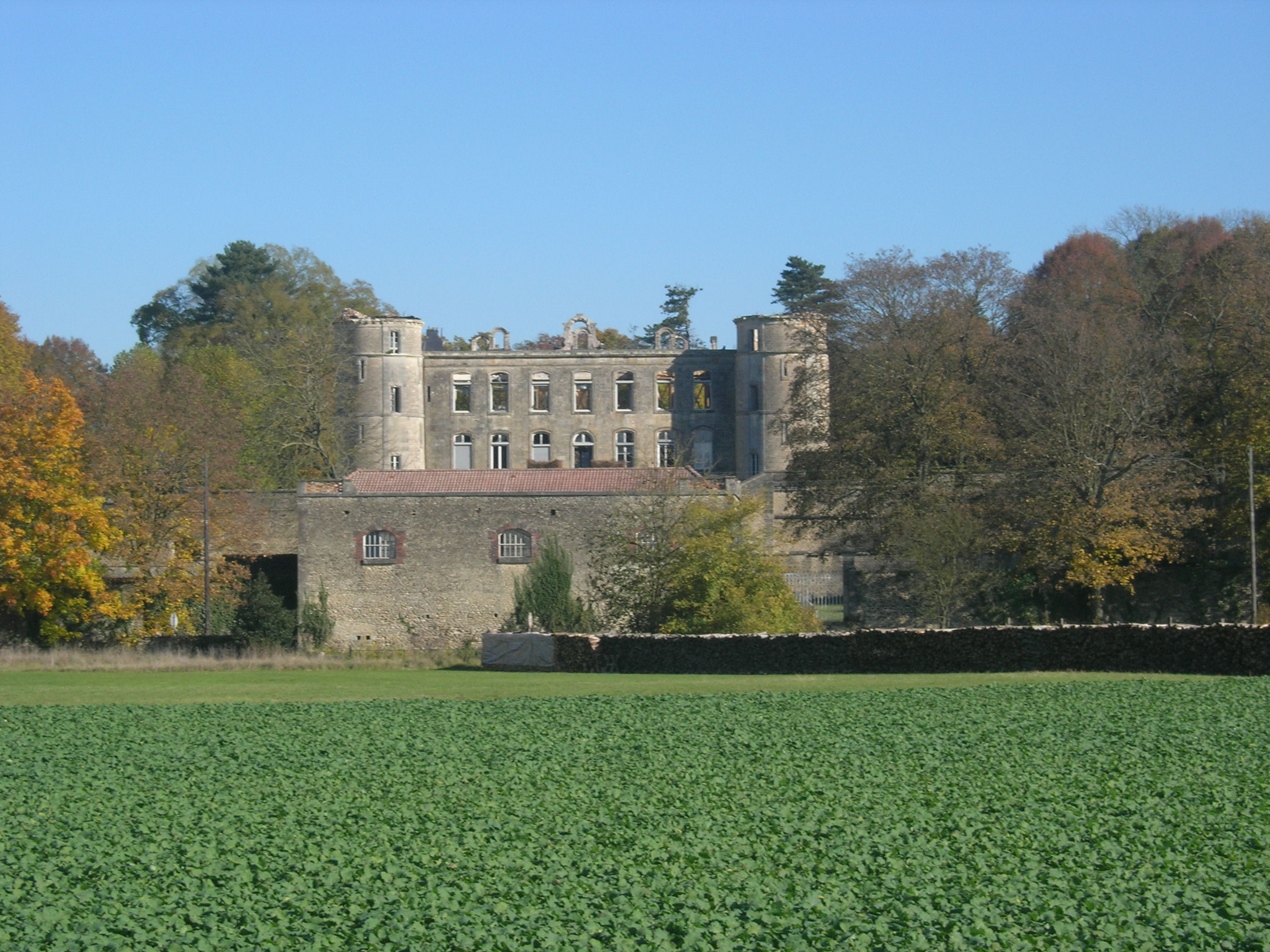 Chateau de Trémilly brulé